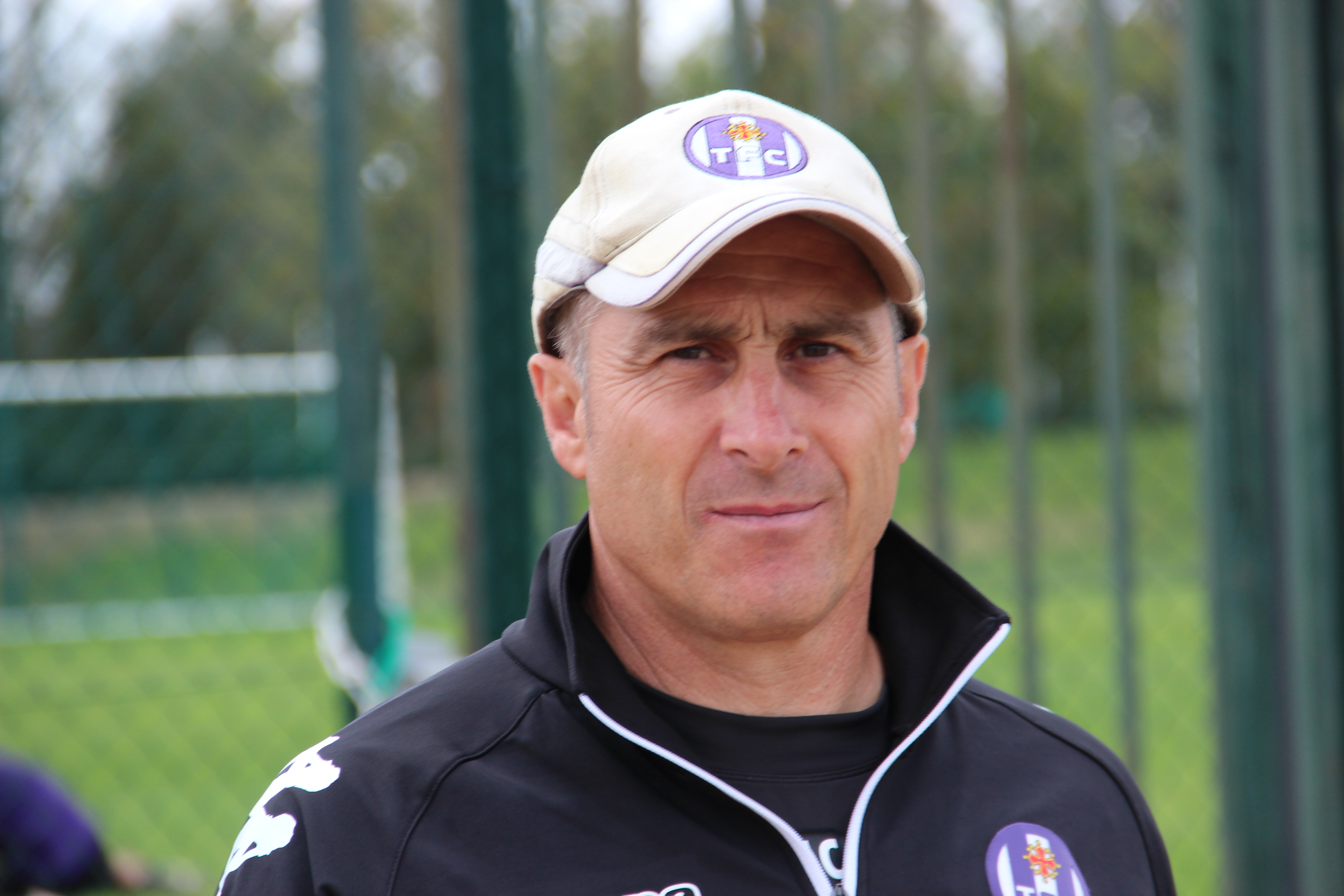 Entraînement du Toulouse Football Club, le 12 septembre 2012. Alain Casanova, entraîneur.